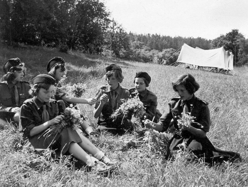 Blomsterbindning, Lemshagaläger, Stockholm, 1940-talet